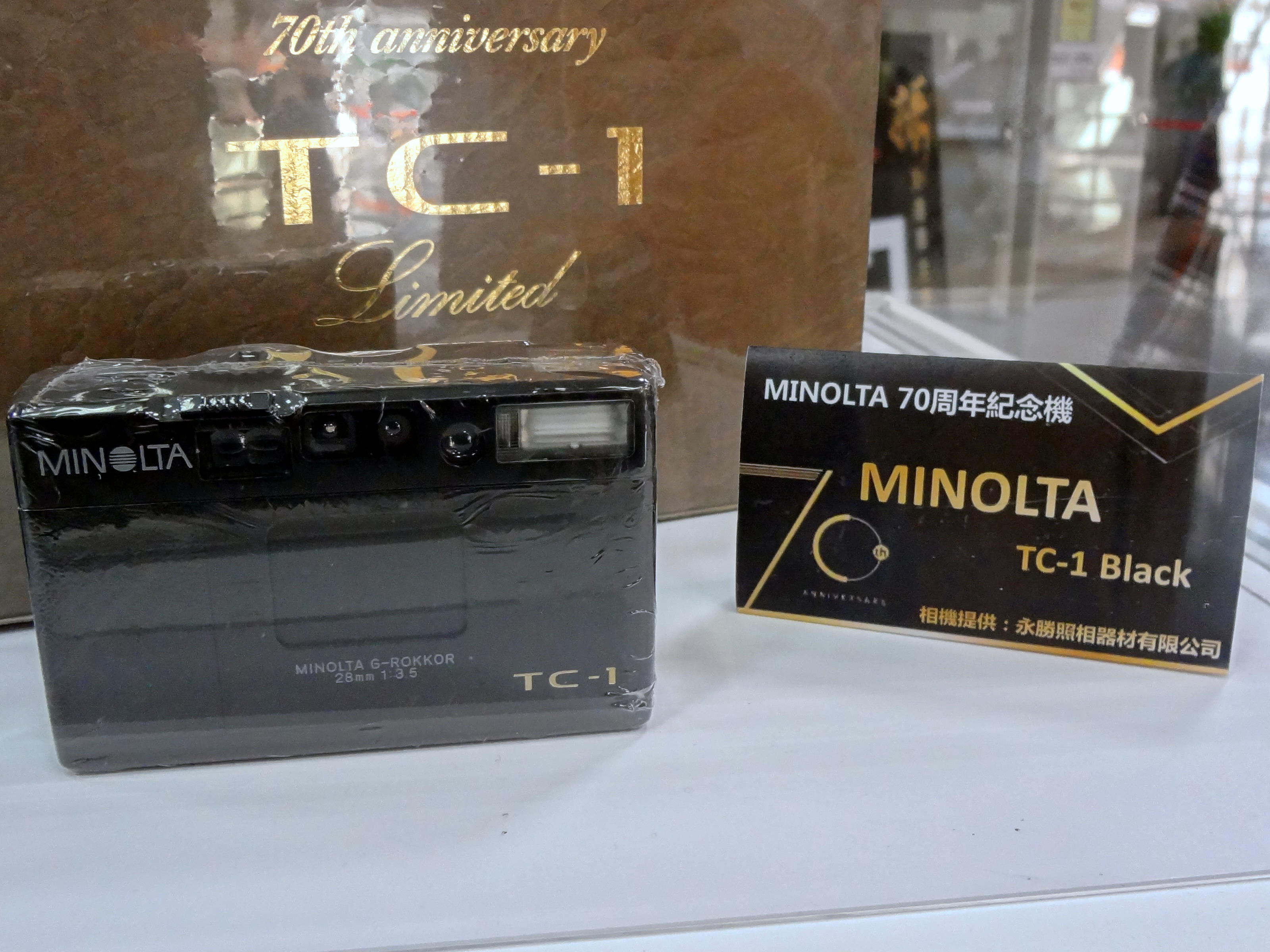 2018台北國際攝影器材暨影像應用大展，美能達TC-1黑色款，美能達70周年紀念機。